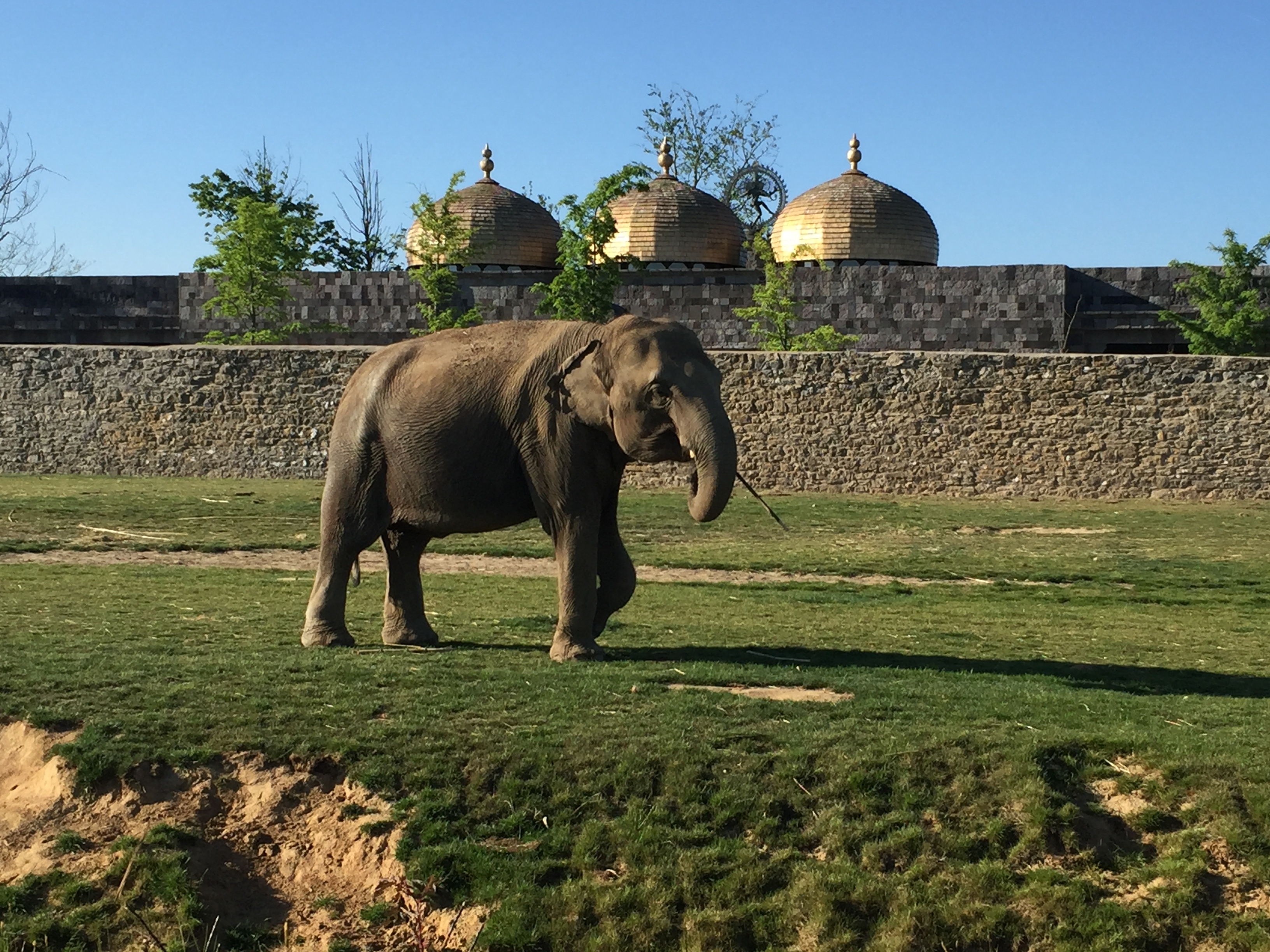 Elefante en el parque Pairi Daiza (Brugelette, Bélgica) con paisaje de estilo indio al fondo.